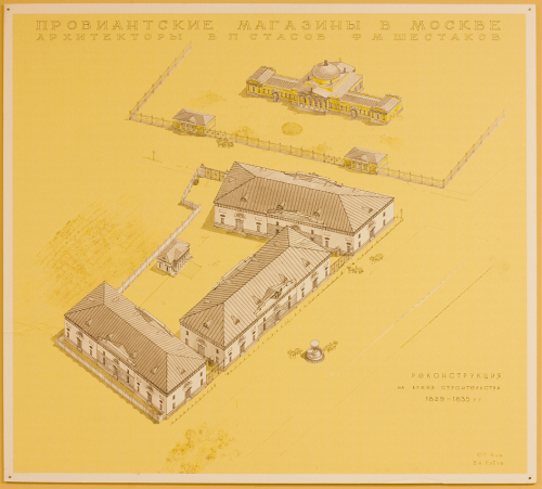 Провиантские склады, чертеж